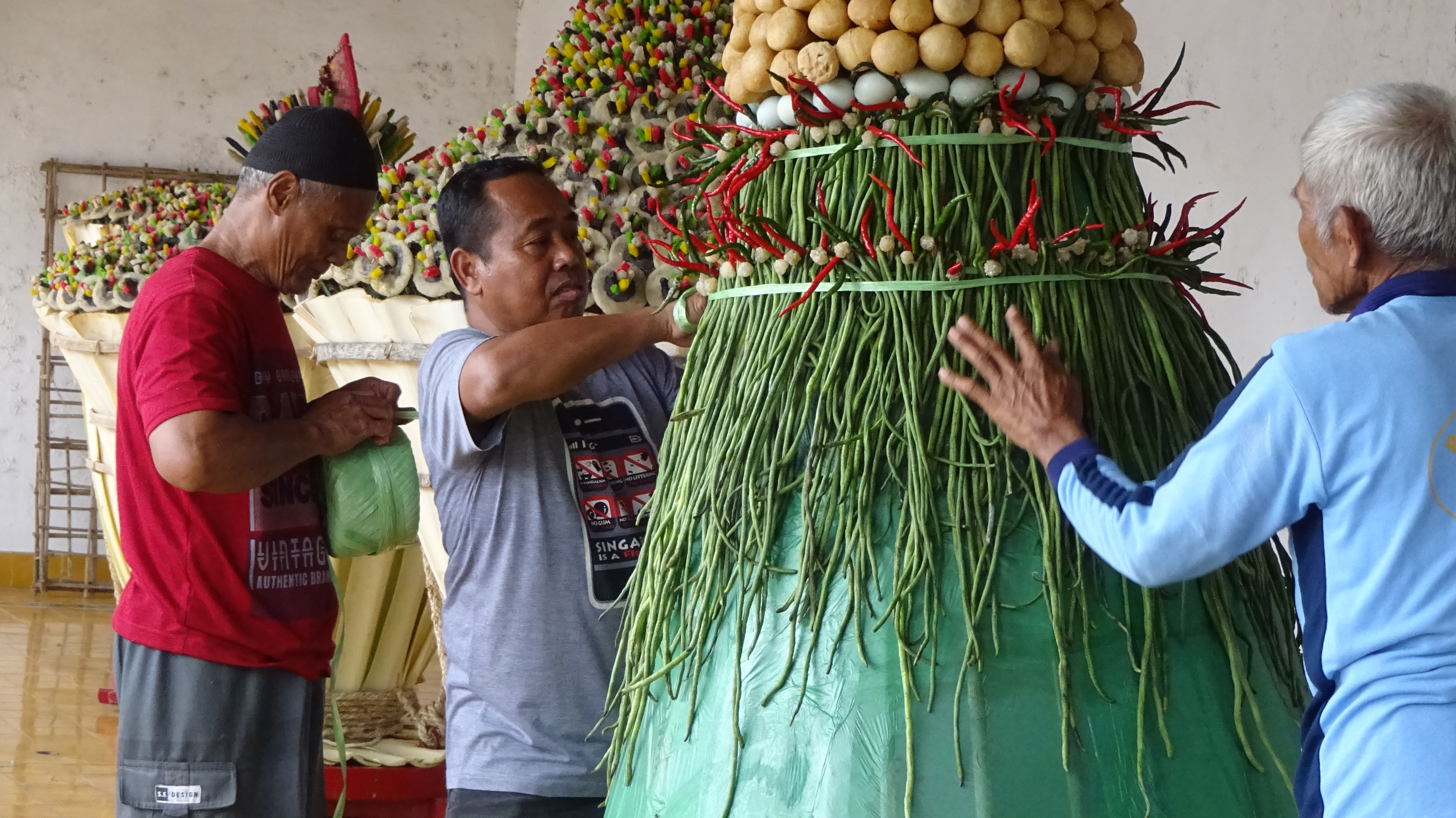 Prosesi pembuatan gunungan garebeg di Keraton Yogyakarta dilakukan beberapa hari menjelang pelaksanaan acara. Para abdi dalem yang bertugas membuat gunungan bekerja dengan teliti untuk menghasilkan rangkaian gunungan yang kokoh dan indah.